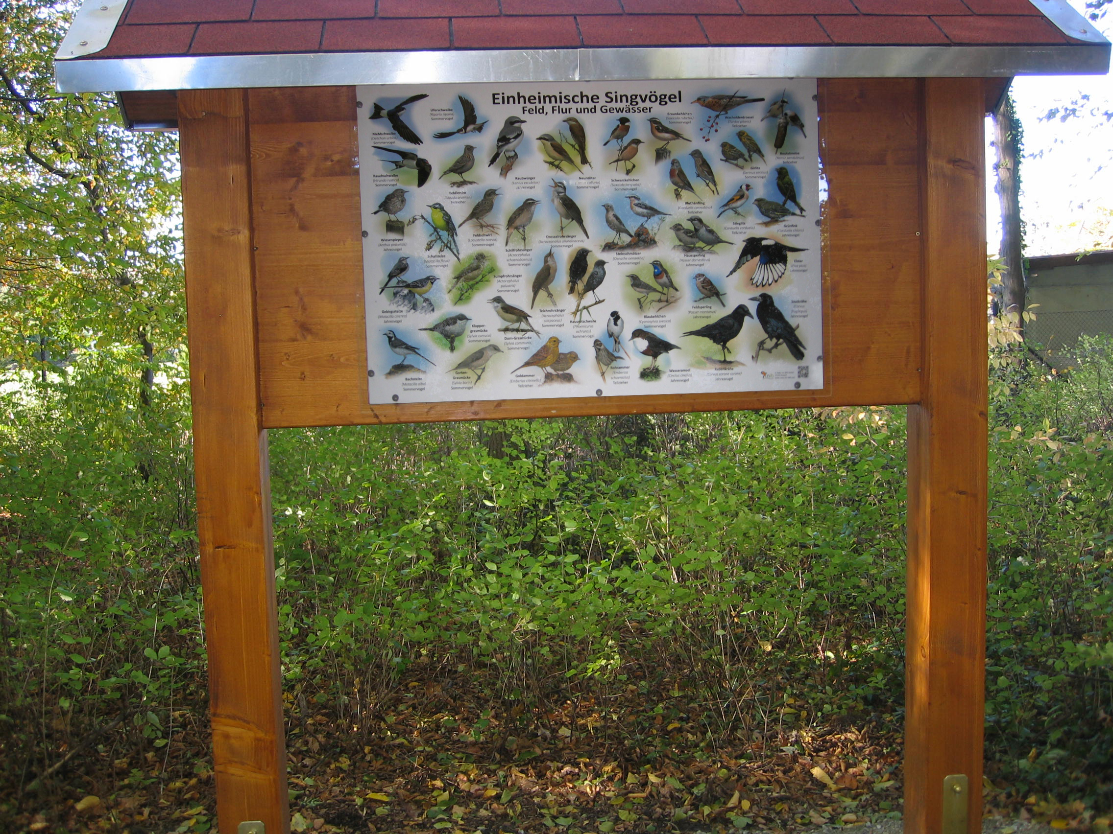 Geschwister-Scholl-Weg Ruhland, Informationstafel Einheimische Singvögel Feld, Flur und Gewässer, Ostansicht